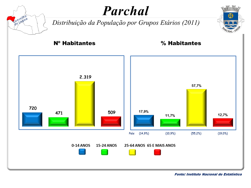 Censos 1864/2011